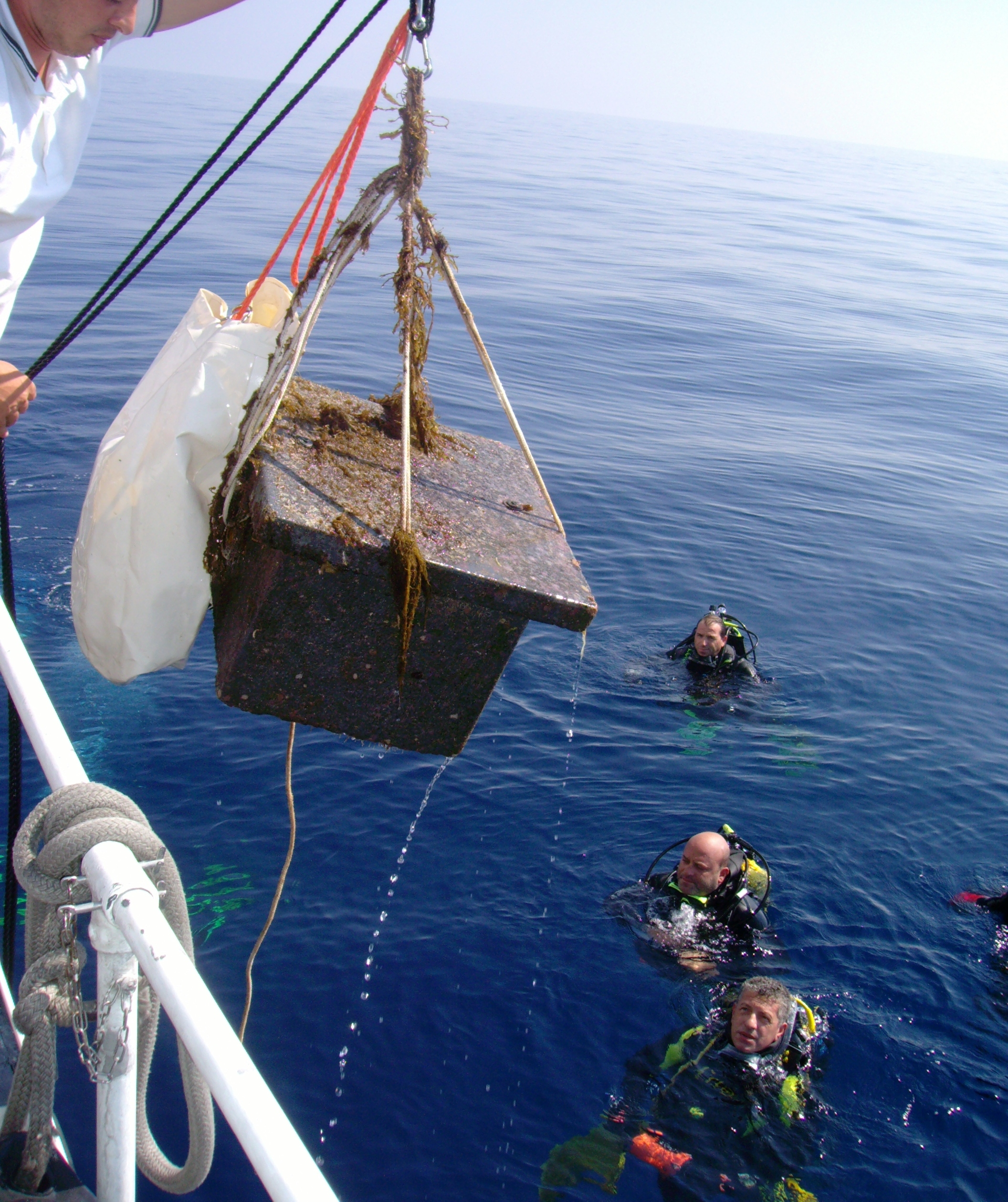 Recupero del "Sarcofago" contenente un sigmografo posizionato sull'Isola sommersa "Ferdinandea", nel 2006. Il recupero è avvenuto il 22.9.2007 da bordo della MV CP 282